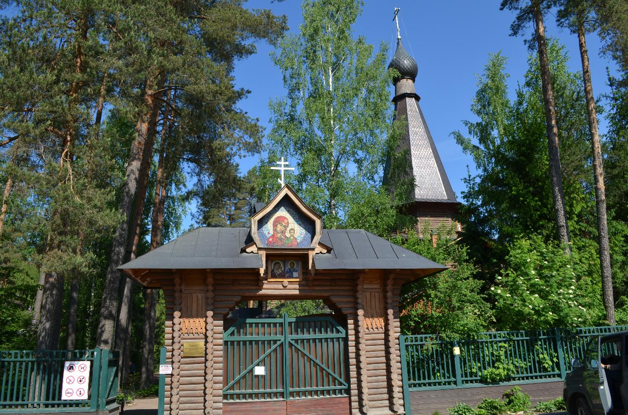 Казанская церковь, посёлок Вырица, Ленинградская область